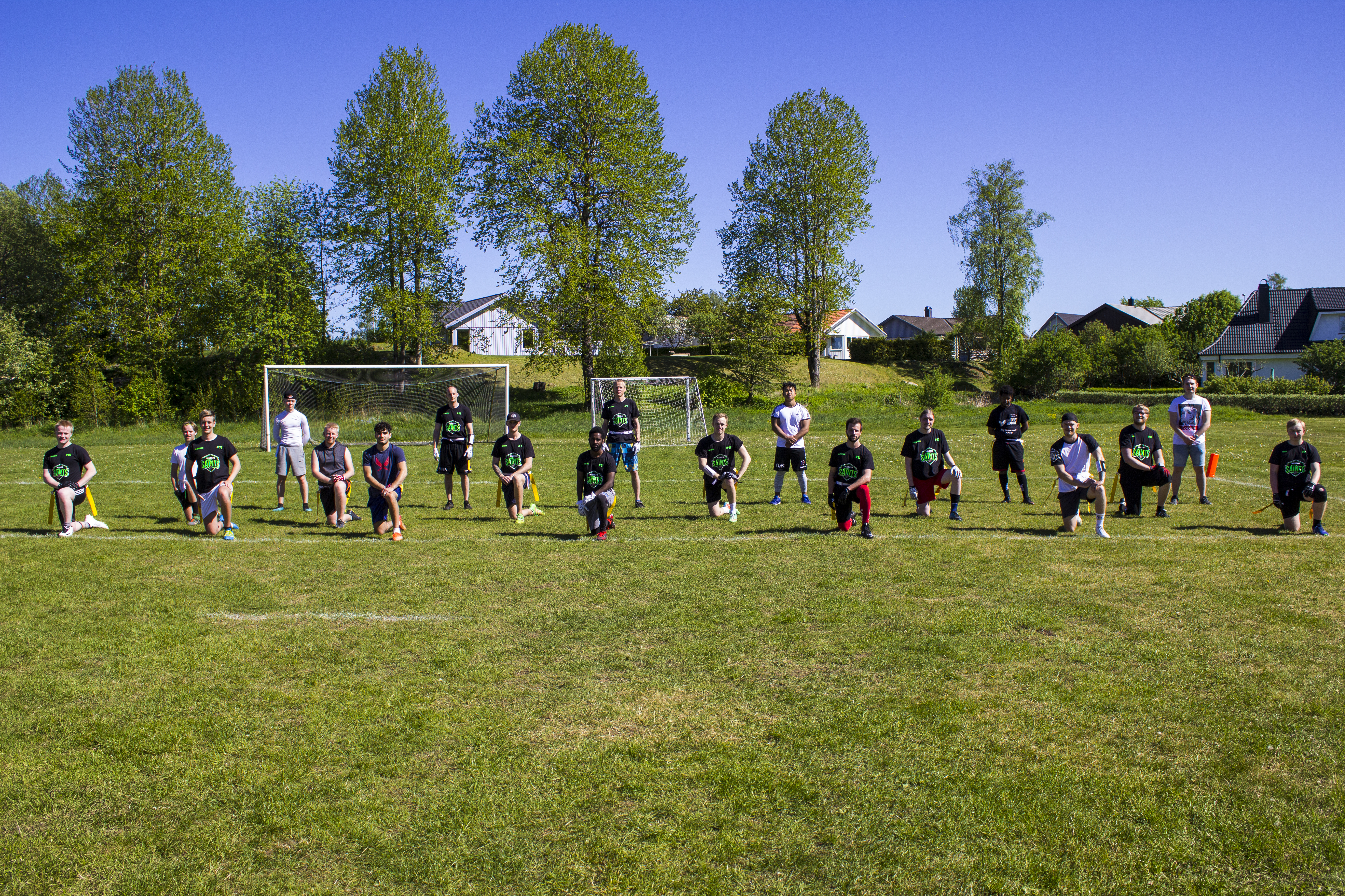 En gruppbild på ett av Flaggfotbollslagen i Sverige. På bild: Nässjö Saints